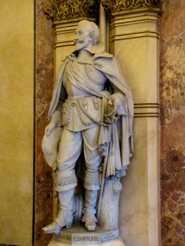 Statue des Heinrich von Dampierre in der Feldherrenhalle des Heeresgeschichtlichen Museums in Wien.